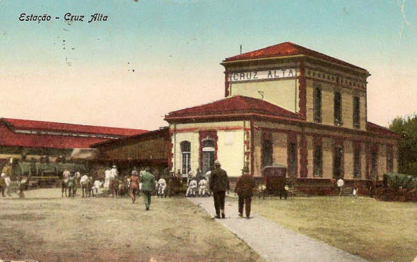 Estação Ferroviária de Cruz Alta